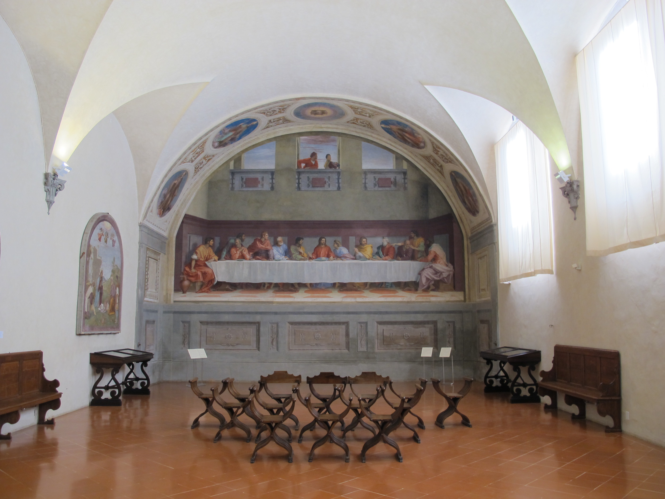 Cenacolo di Andrea Del Sarto - MIBAC This is a photo of a monument which is part of cultural heritage of Italy.